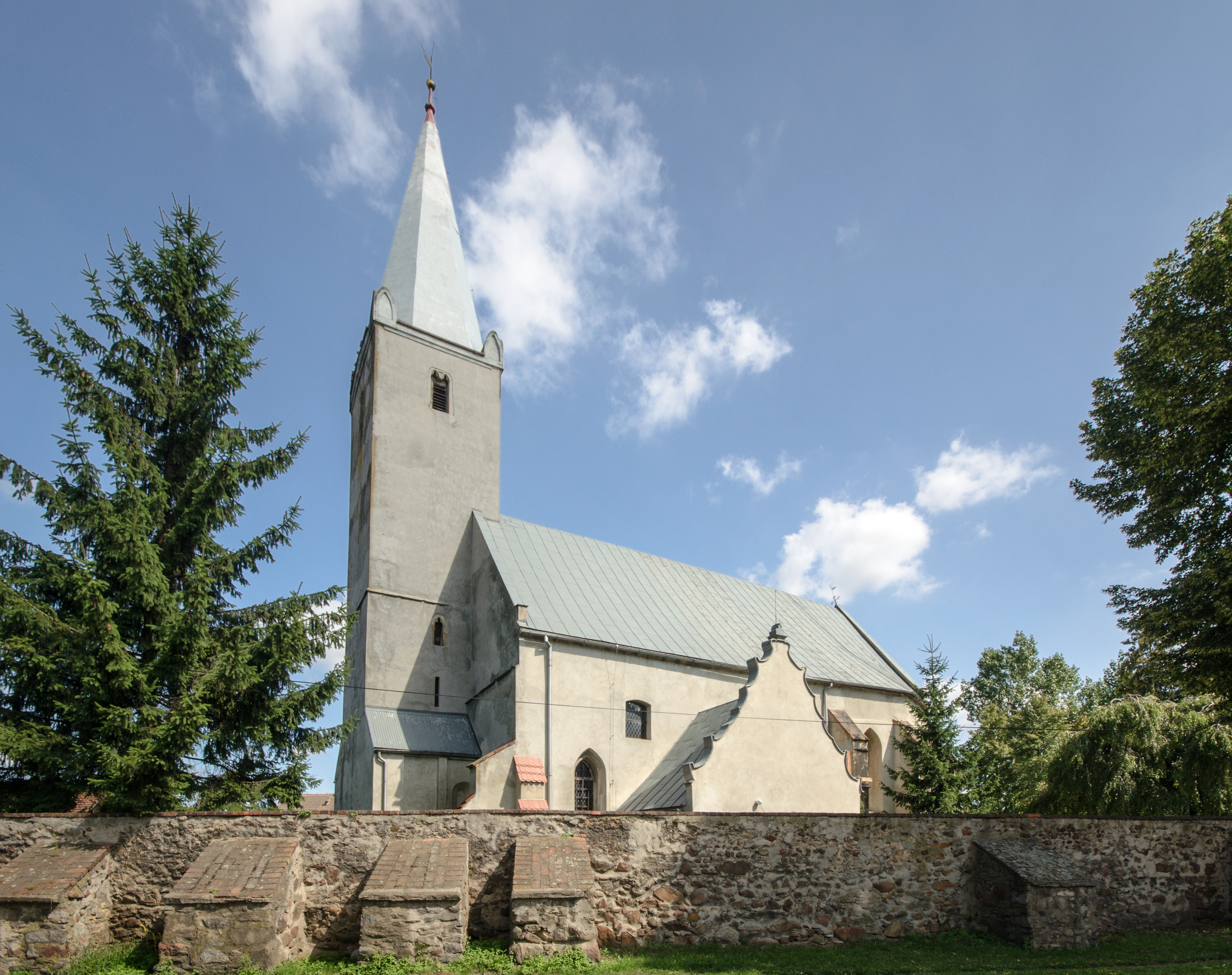 Bąków - rzymskokatolicki kościół filialny p.w. św. Katarzyny, poł. XIV, XVI